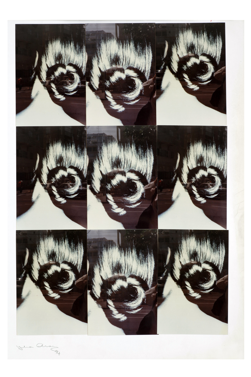 קולאז', עבודה של האמנית אילונה אהרון